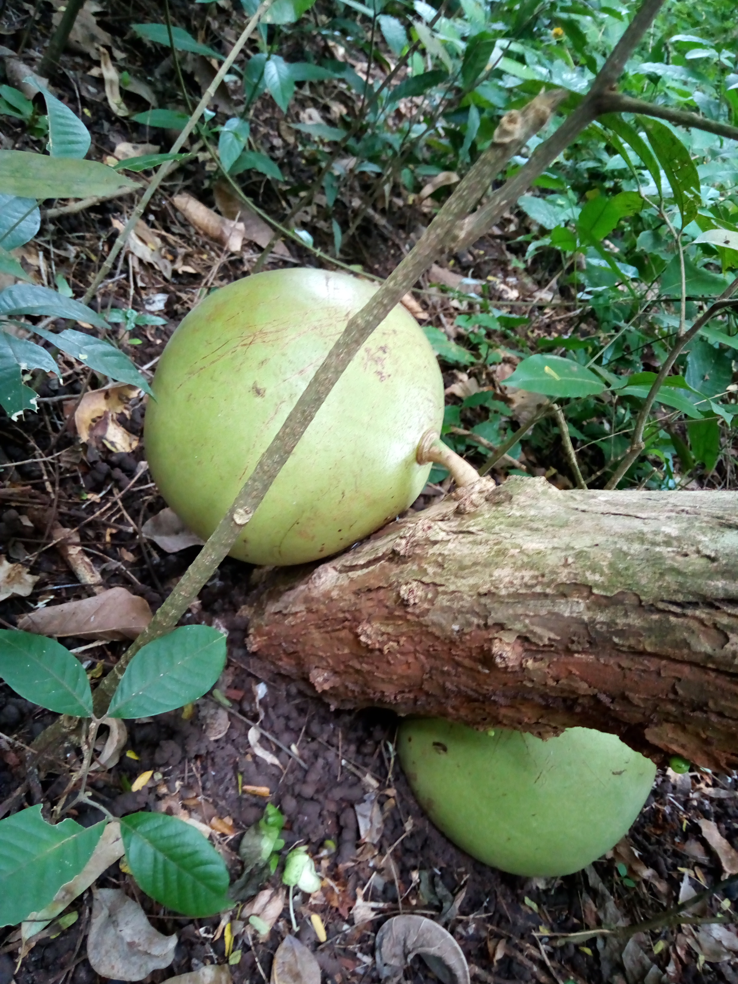 Calebasse servant à fabriquer les ustensiles à plusieurs utilités